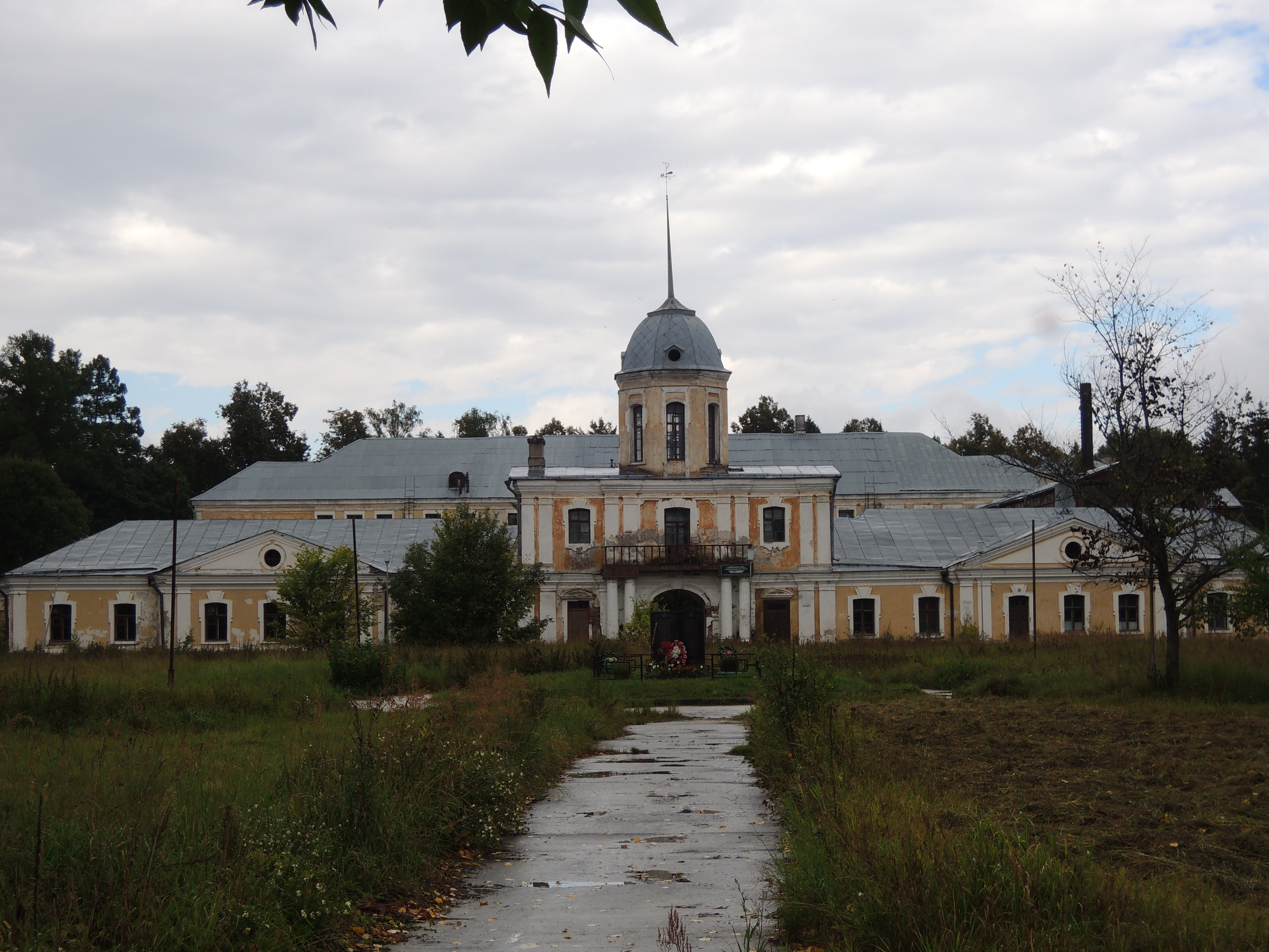 Дворец: Андреевское, Петушинский район, Владимирская область